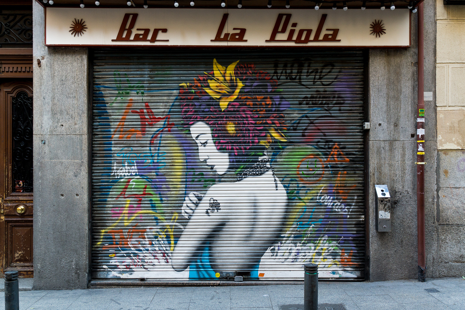 Bar La Piola, calle del León nº9, Madrid, España.